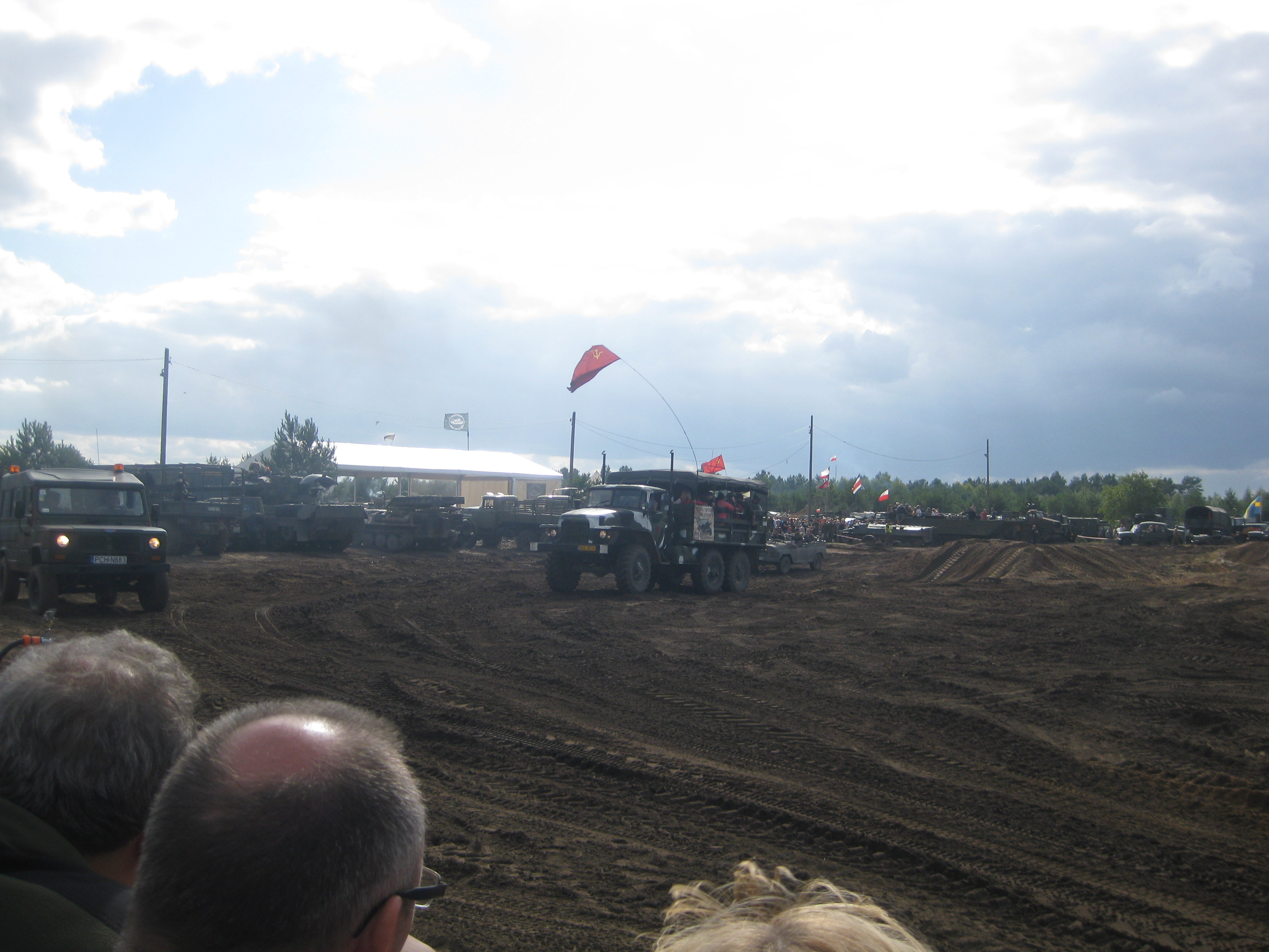 XI Międzynarodowy Zlot Pojazdów Militarnych - 7